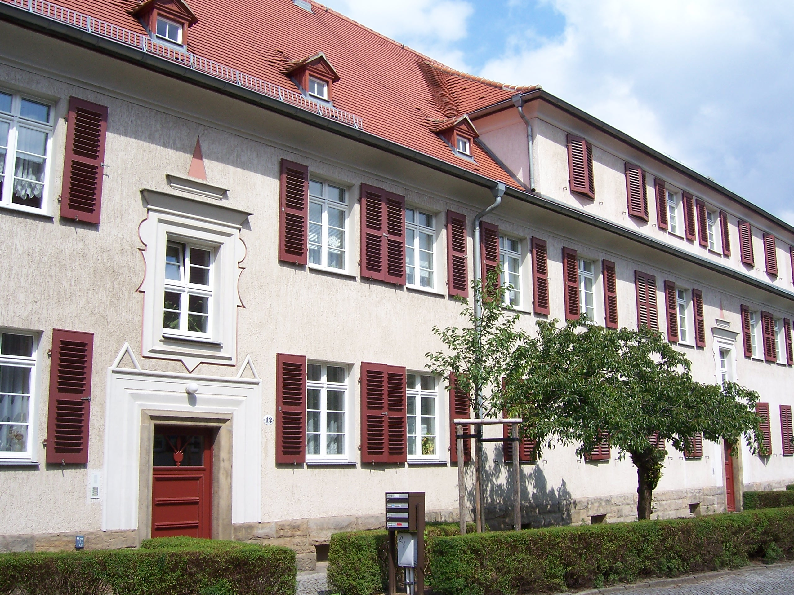 Wohnhaus. Fassadenbeispiel.